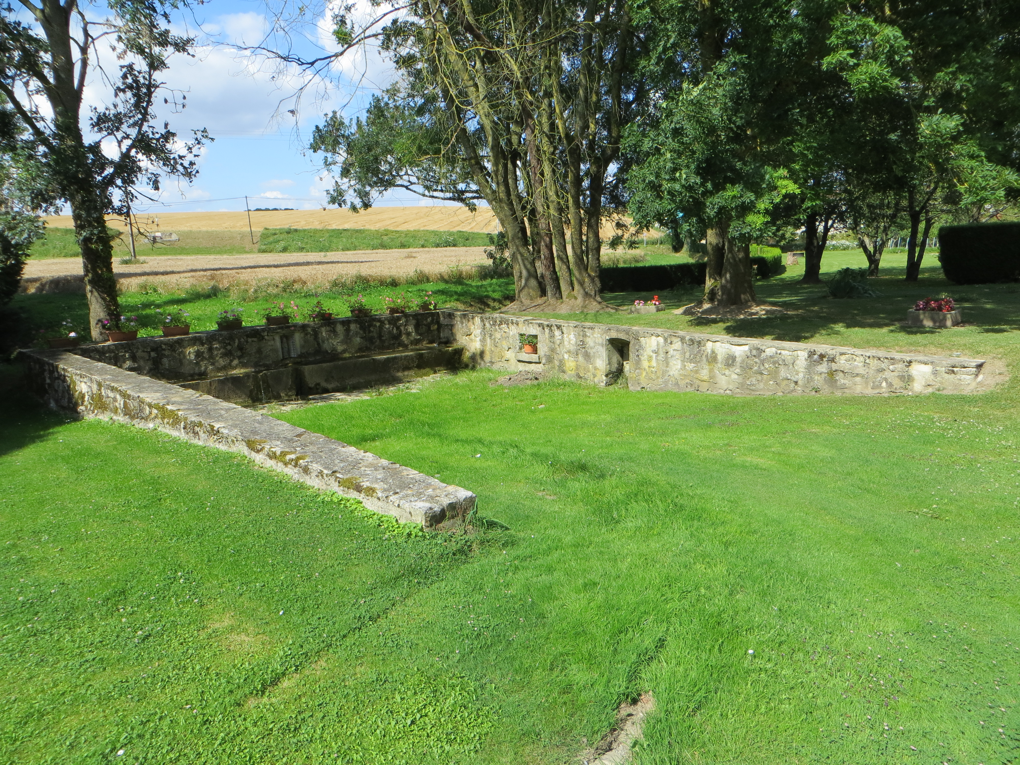 Vue générale de la fontaine